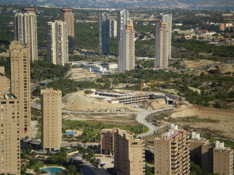 Inicio obras Intempo